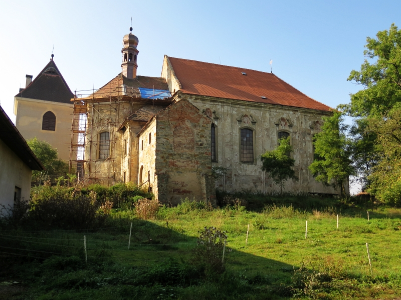 Kostel svatého Václava, náves, Březno (okres Mladá Boleslav).